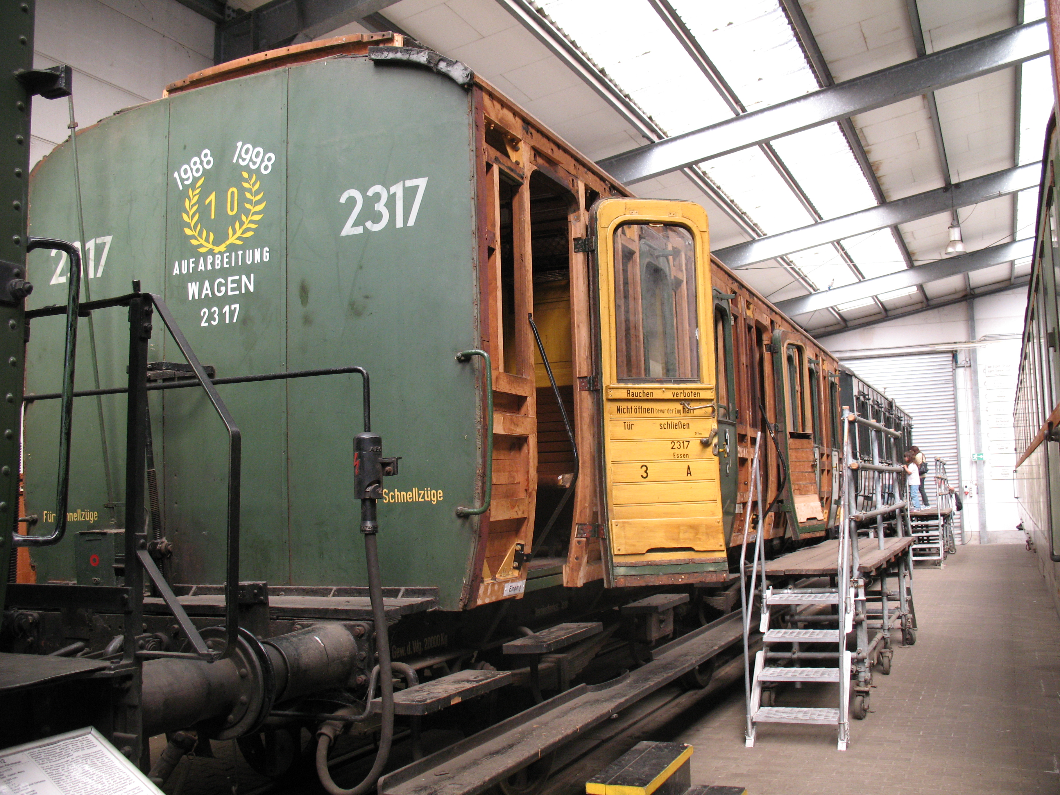 Preussischer Personenwagen "Essen 2317", Baujahr 1913, Hersteller: Van der Zypen & Charlier Köln; Eisenbahnmuseum Bochum-Dahlhausen